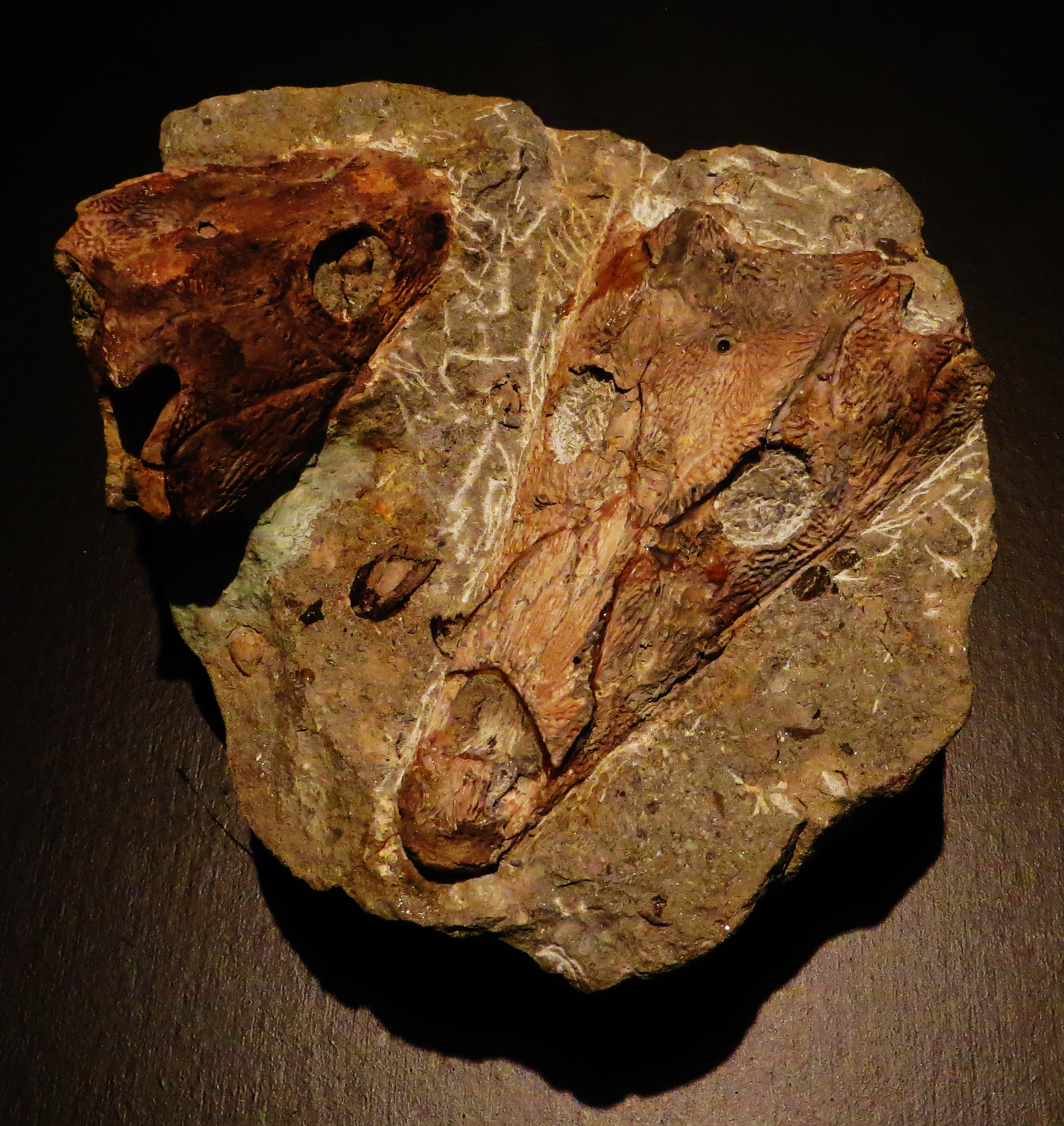 Fossil of Thoosuchus, an extinct amphibian- Took the picture at Dinosaurium, Prague